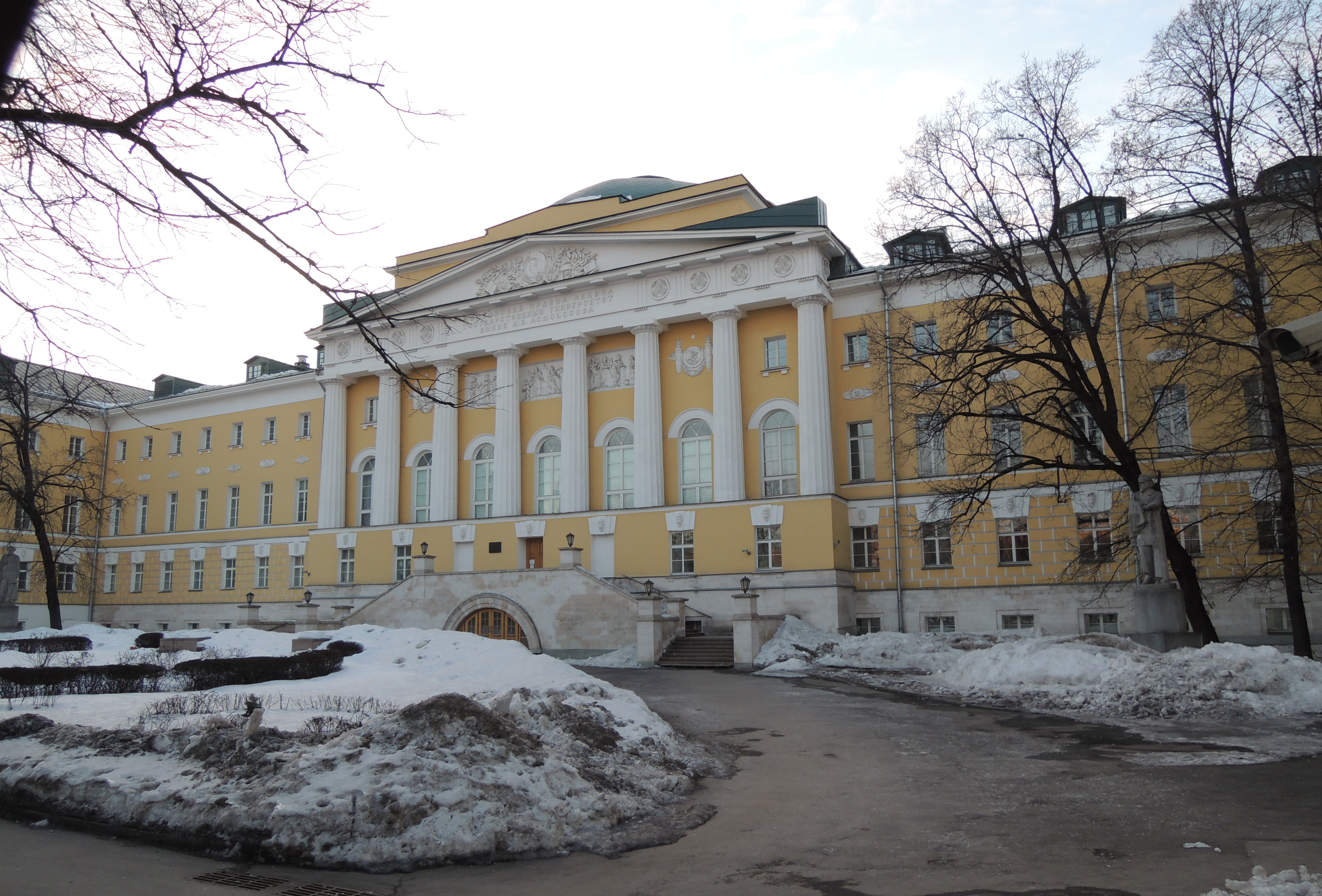 Старое здание МГУ на Моховой